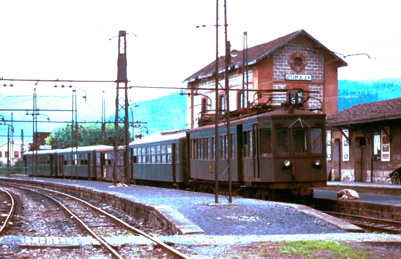 Tren de FEVE en Zumaya. Se trata de la antigua estación de los Ferrocarriles Vascongados, hoy desaparecida.